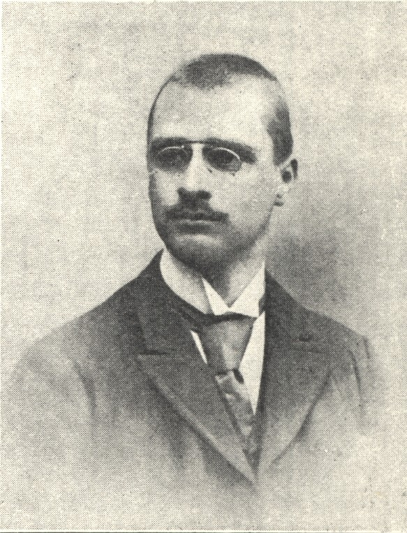 Baron Johan Mannerheim